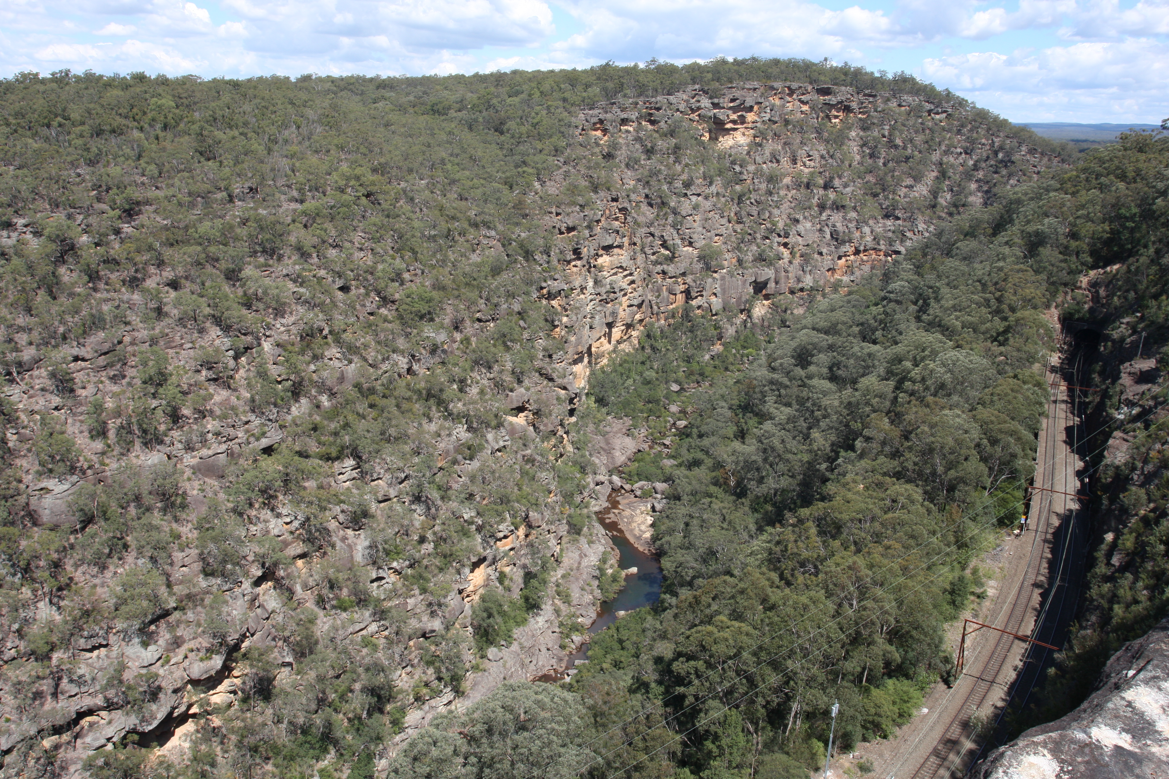 Glenbook creek